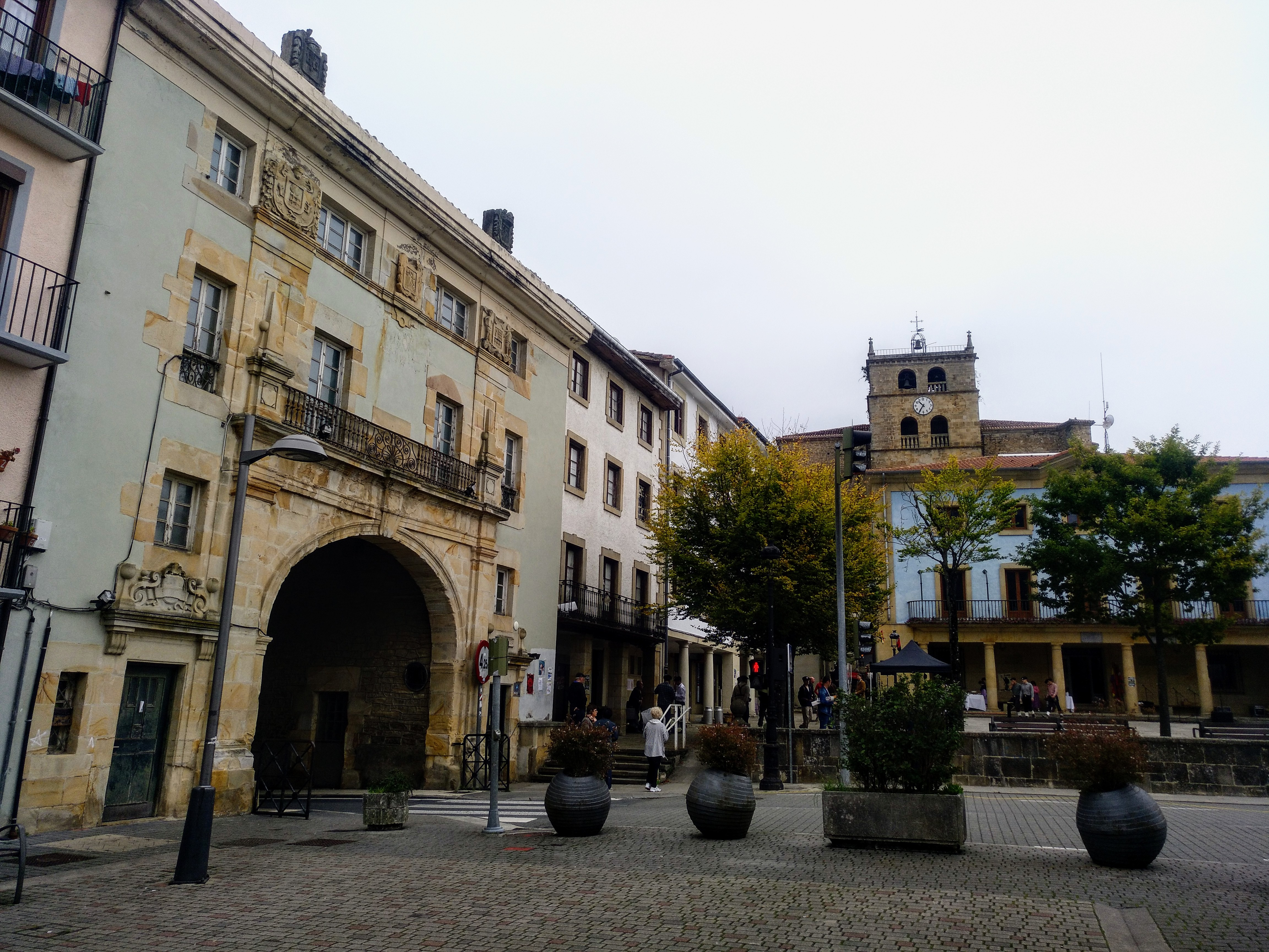 Elgetako alde zaharra